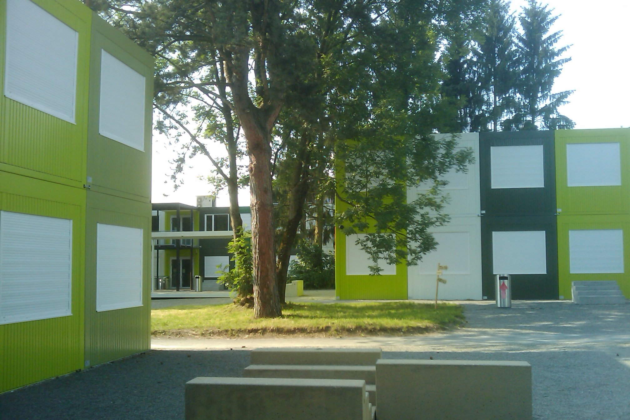 Building of the Cantonal School in Uster, Canton of Zurich, Switzerland.